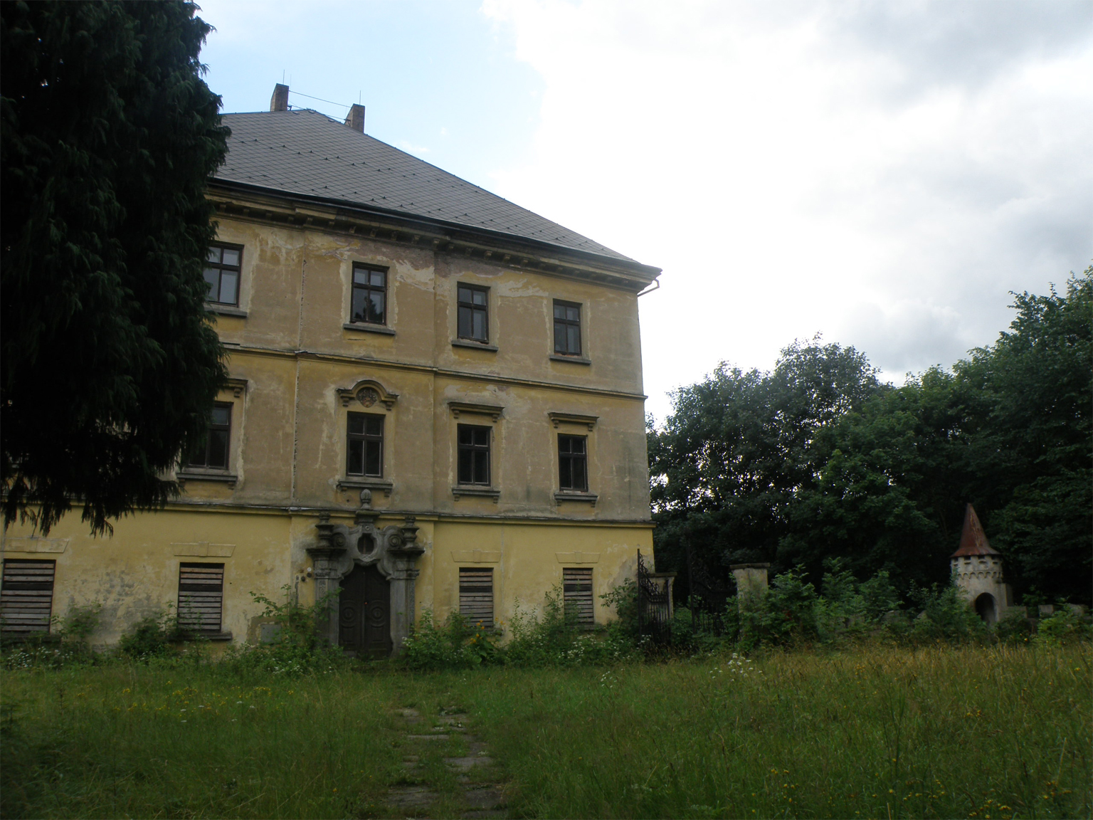 Zámek Žacléř, Zámecká 1, okres Trutnov. Areál zámku s hlavní budovou